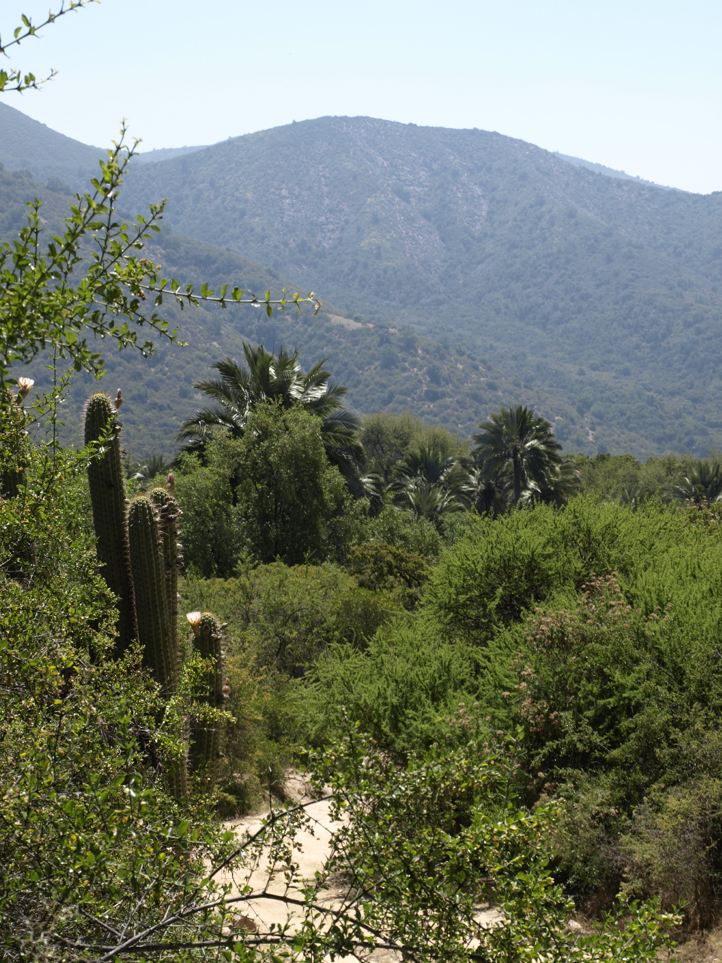 Parque Nacional La Campana, Chile.